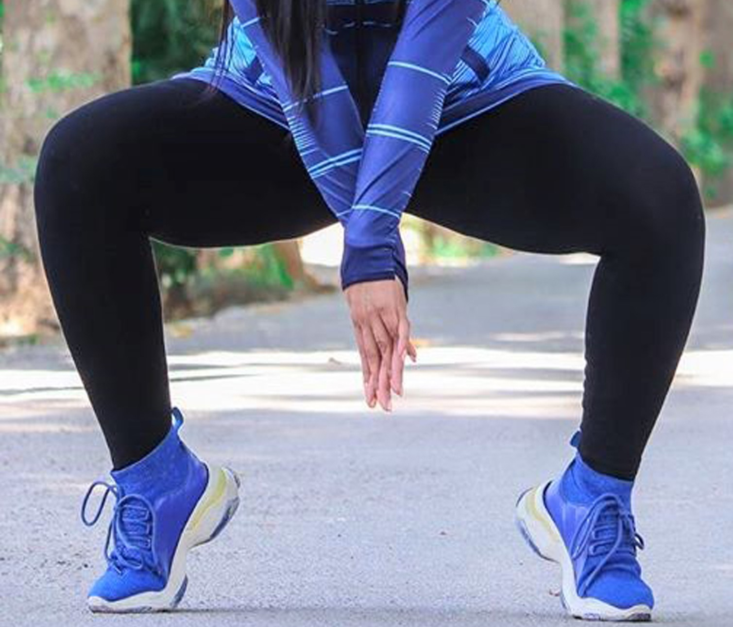 مدل و طراح فشن ایرانی، سارا آهنگی در باغ فاتح ، همچنین دارای سابقه کار در کرج. من عکاس این تصویر هستم و این تصویر را شما می توانید به شکل رایگان و بدون هیچ شرطی برای هر منظوری استفاده کنید. استفاده تجازی هم آزاد است و مانعی ندارد. لطفا پایین را ببینید برای اطلاعات بیشتر. خود مدل می تواند از تصاویر استفاده کند اما با همین مجوز ذکر شده در صفحه.